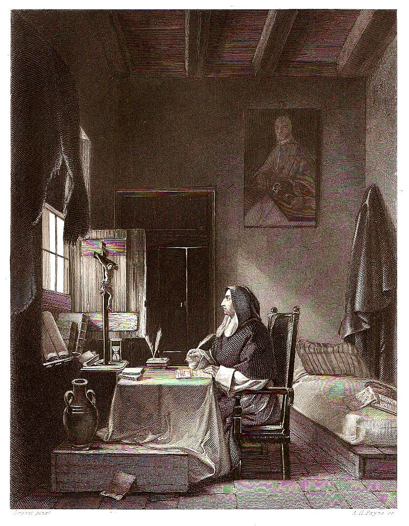 Gravura